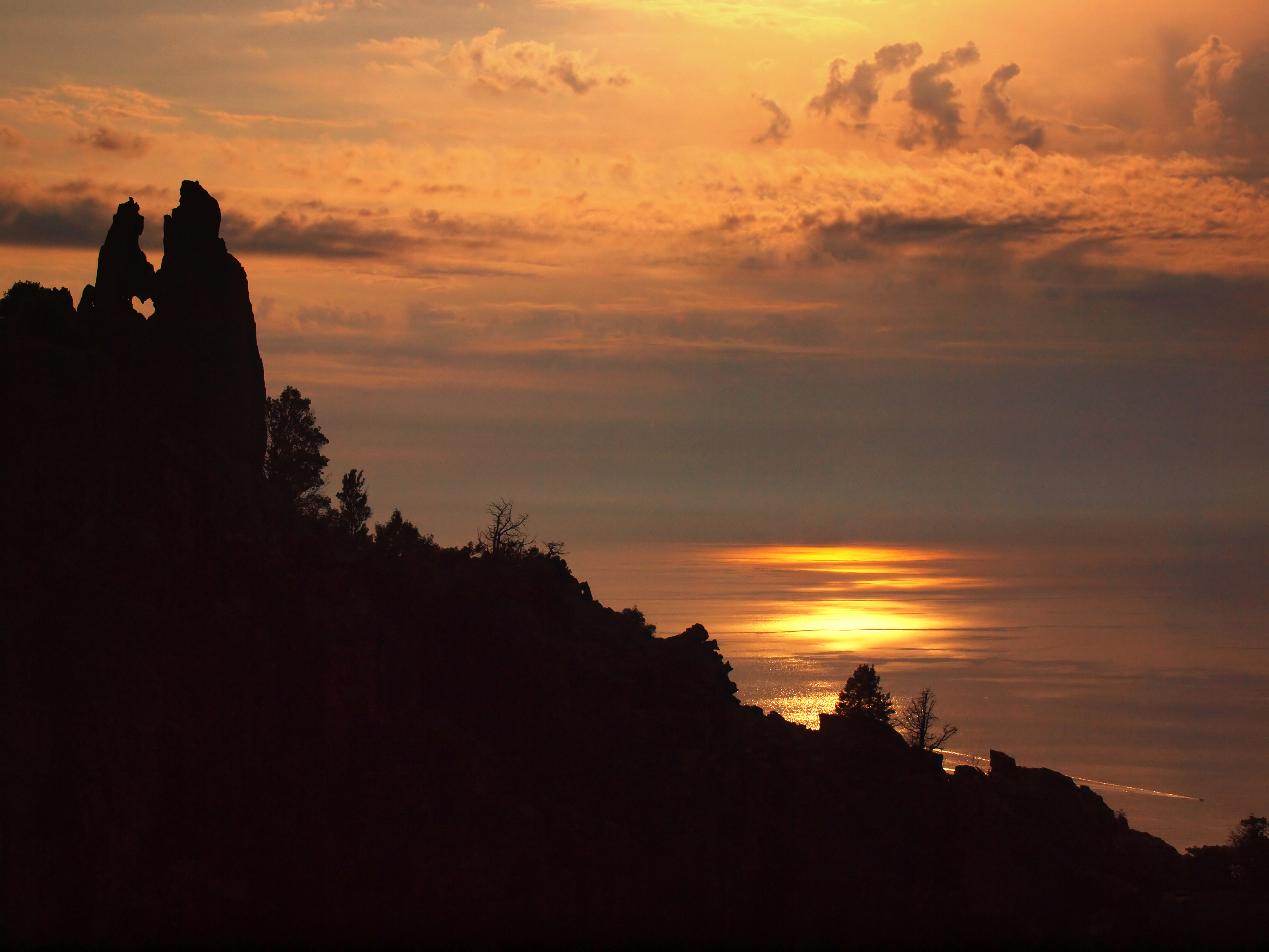 Piana, Ouest Corse (Corse) - Coucher de soleil sur le golfe de Porto. À gauche, le rocher dit "des Amoureux" des Calanche de Piana (site inscrit au Patrimoine mondial de l'UNESCO)